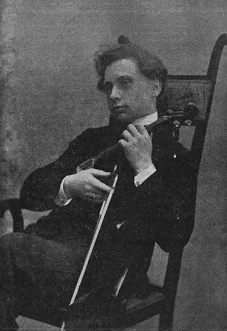 Jaroslav Kocián (-1904)